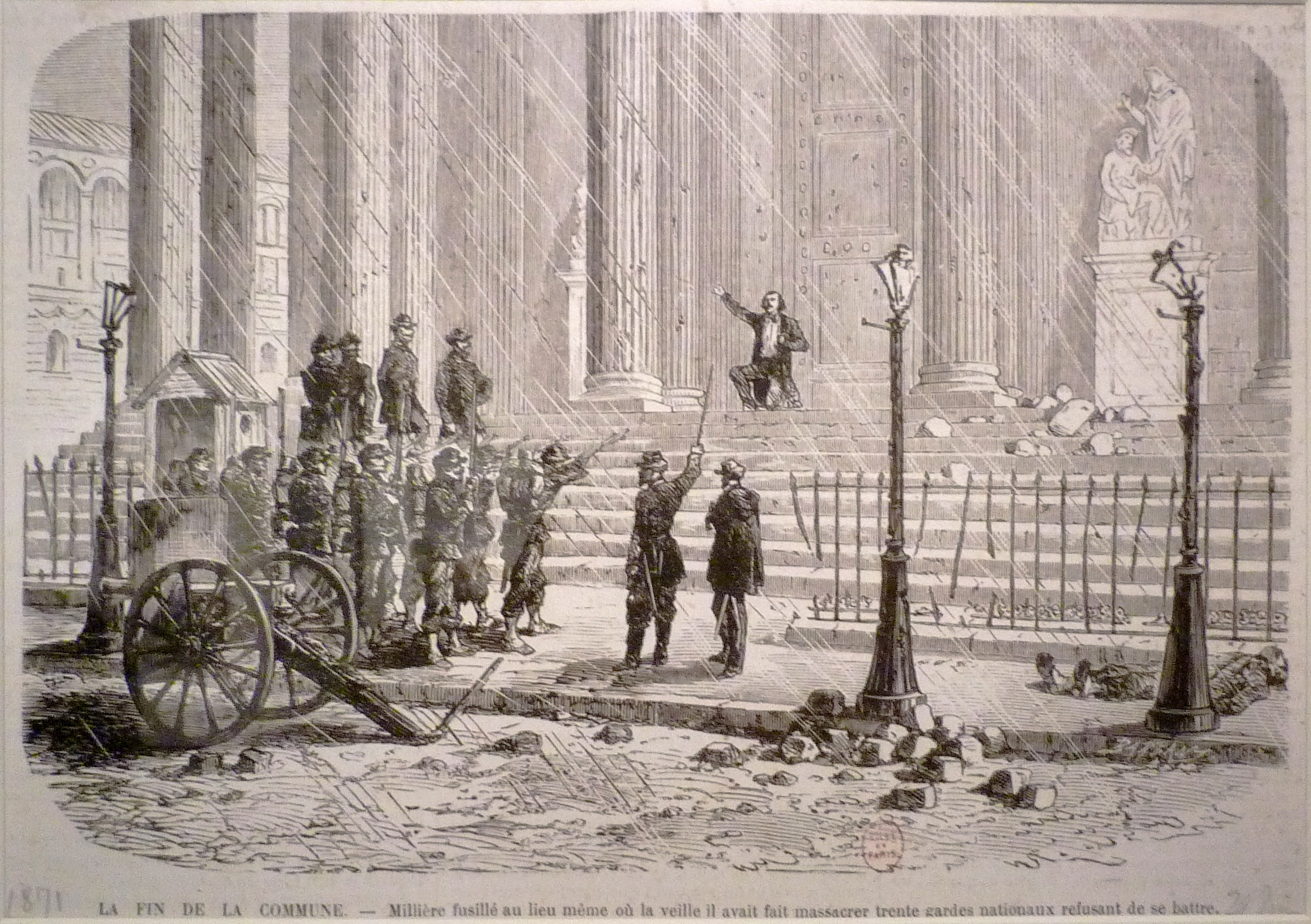 Exposition La Commune de Paris à l'Hôtel de Ville de Paris (18 mars - 28 mai 2011) - 26 mai : exécution de Jean-Baptiste Millière sur les marches du Panthéon - Gravure d'après Henri de Montaut pour Le Monde illustré du 10 juin 1871 - Musée Carnavalet.